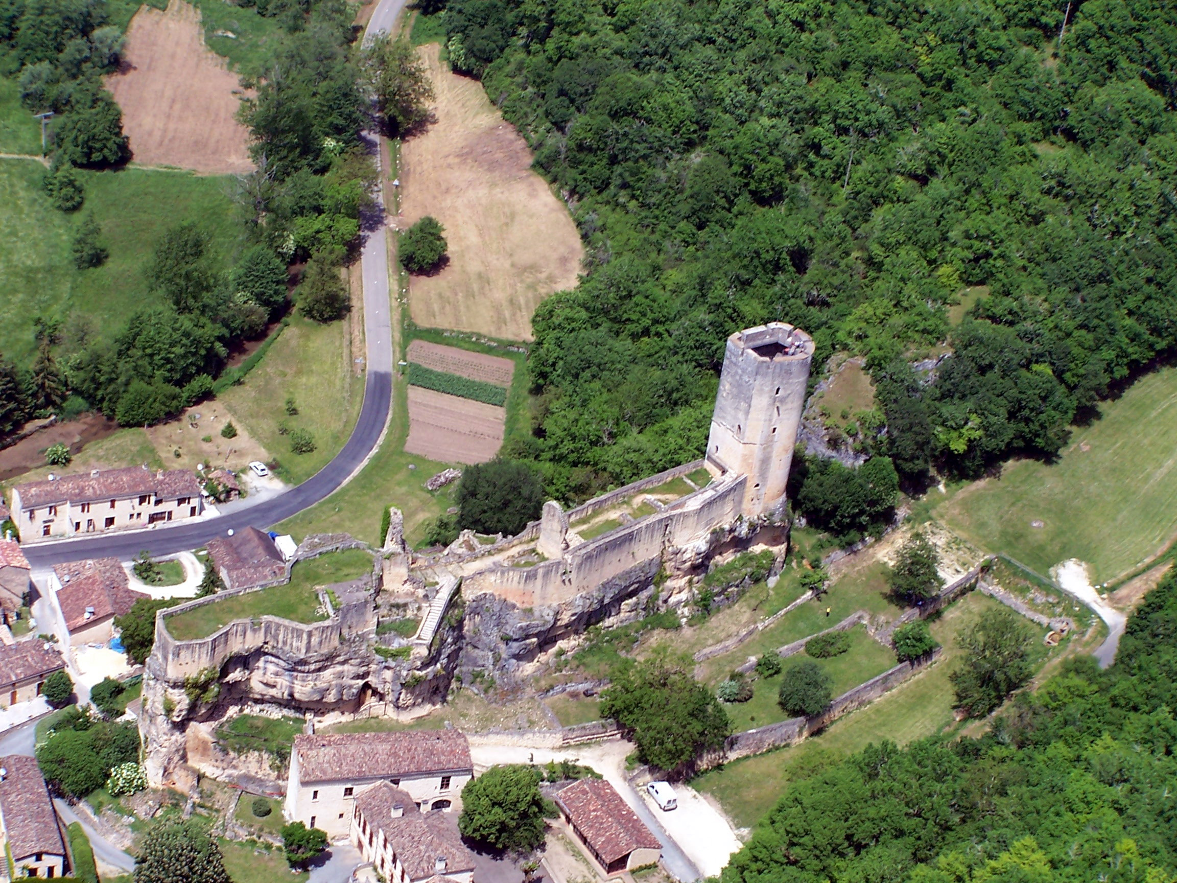 Vue aérienne du Château de Gavaudun (XIIIème Siècle)